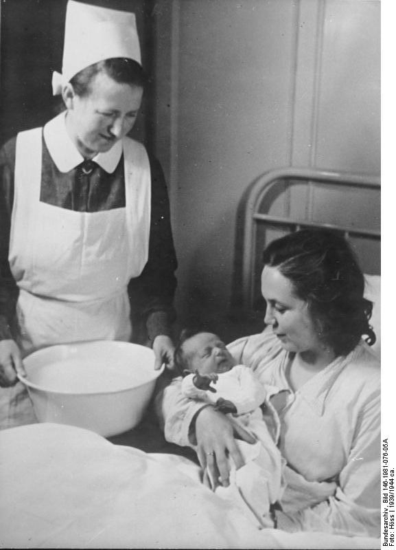 NSV-Mütterheime im Schwarzwald. Überall herrscht eitel Freude über den neuen Familienzuwachs. PK Höß A 125 827 E.M. Orbis